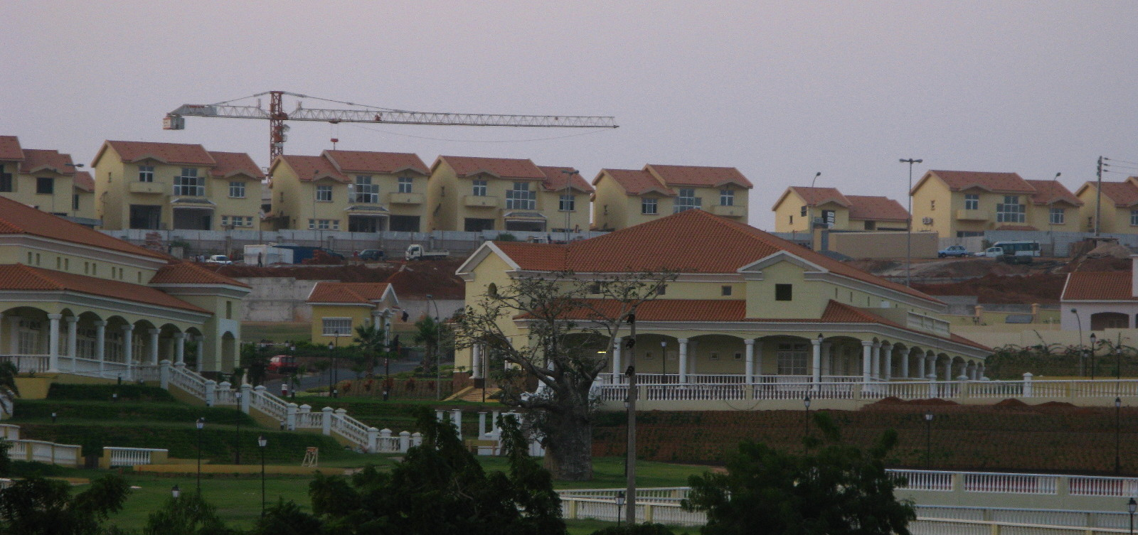 Talatona